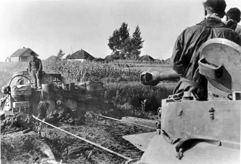 ADN-Bildarchiv, II. Weltkrieg 1939-45 An der Front in der Sowjetunion: Ende September 1943 Ein "Tiger "-Panzer der deutschen Wehrmacht ist beim Überqueren eines sumpfigen Flusses steckengeblieben und wird von einem anderen "Tiger"-Panzer auf festen Boden gezogen Aufnahme: Wolff-Altvater 4834-43 Information added by Wikimedia users.Mid 1943, Tigers of the 3rd Company sPzAbt.503